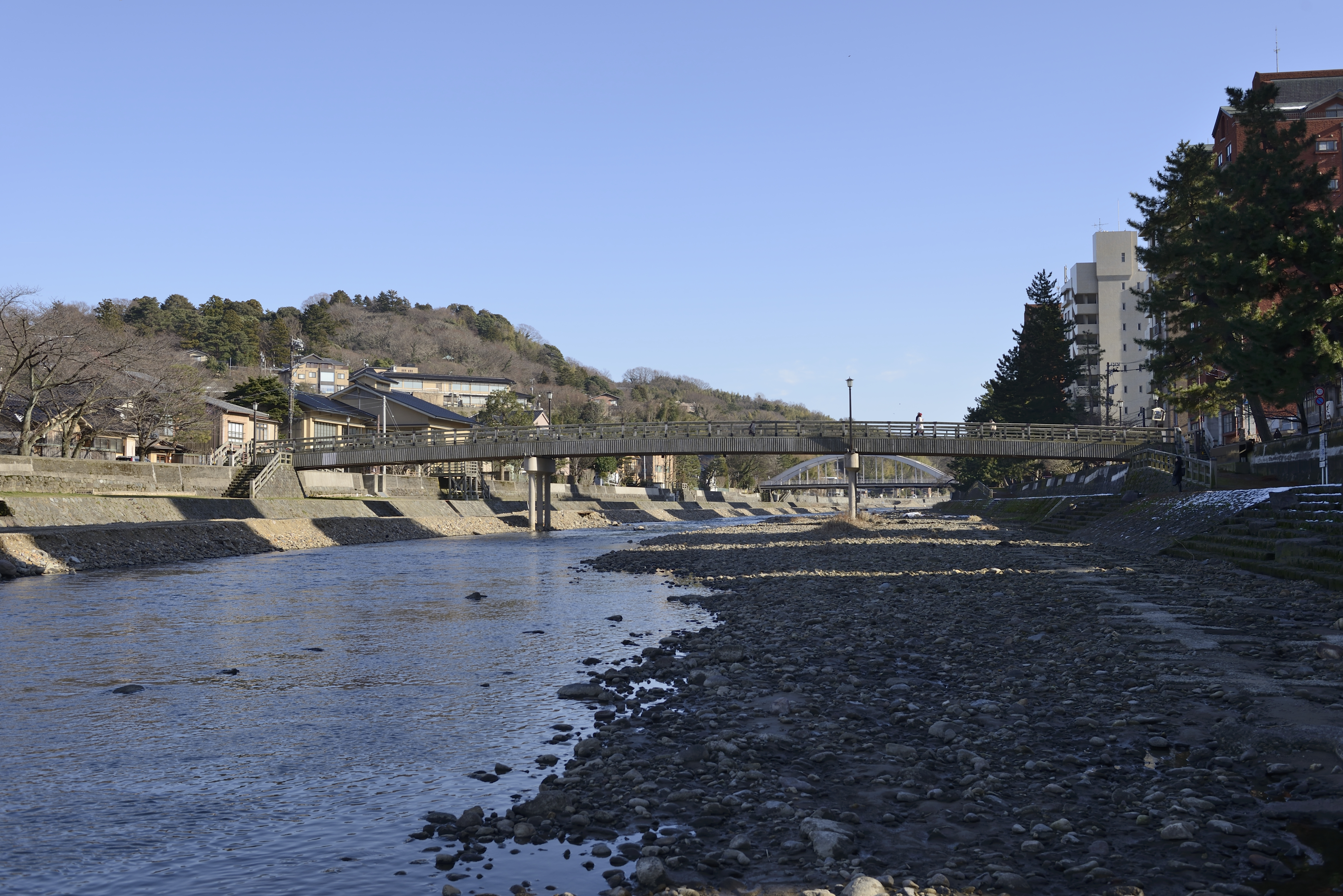 浅野川を含む風景